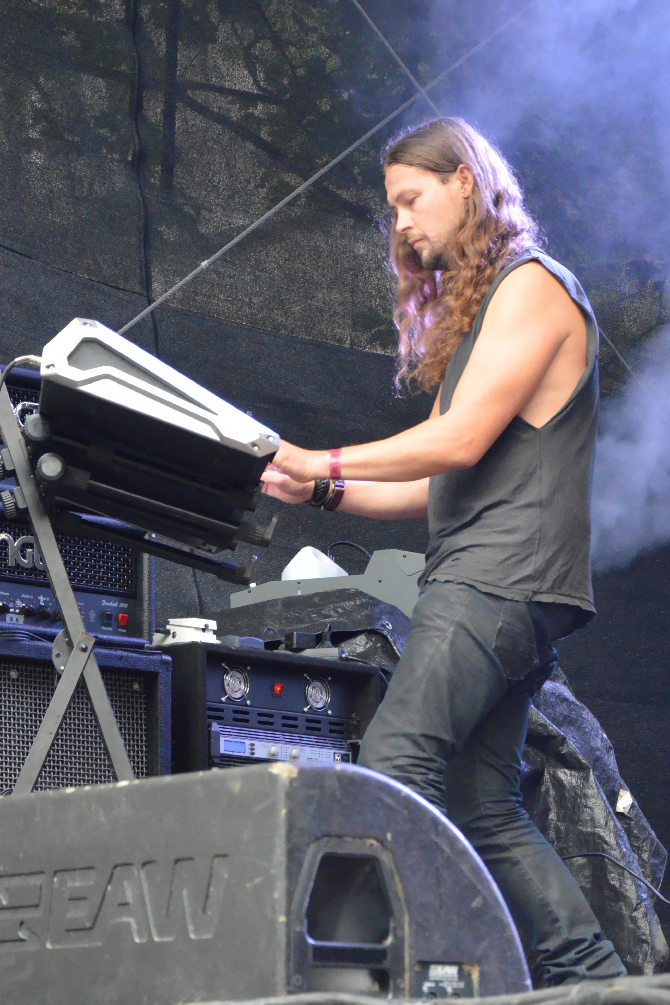 Wolfchant beim Turock Open Air 2013 in Essen